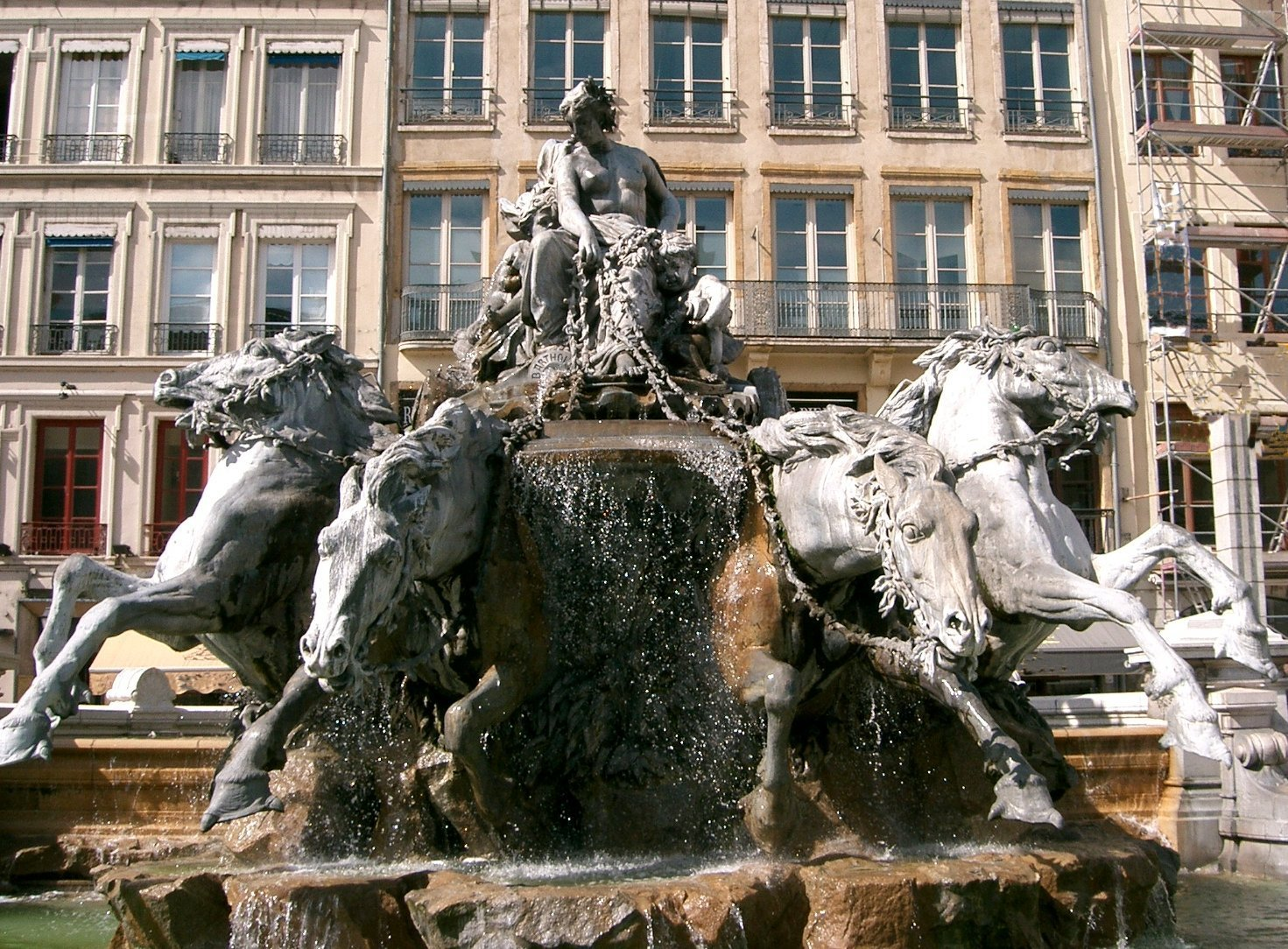 Barthodi - sculpture XIX° siècle - Fontaine des Terreaux à Lyon "les Fleuves allant à l'Océan"